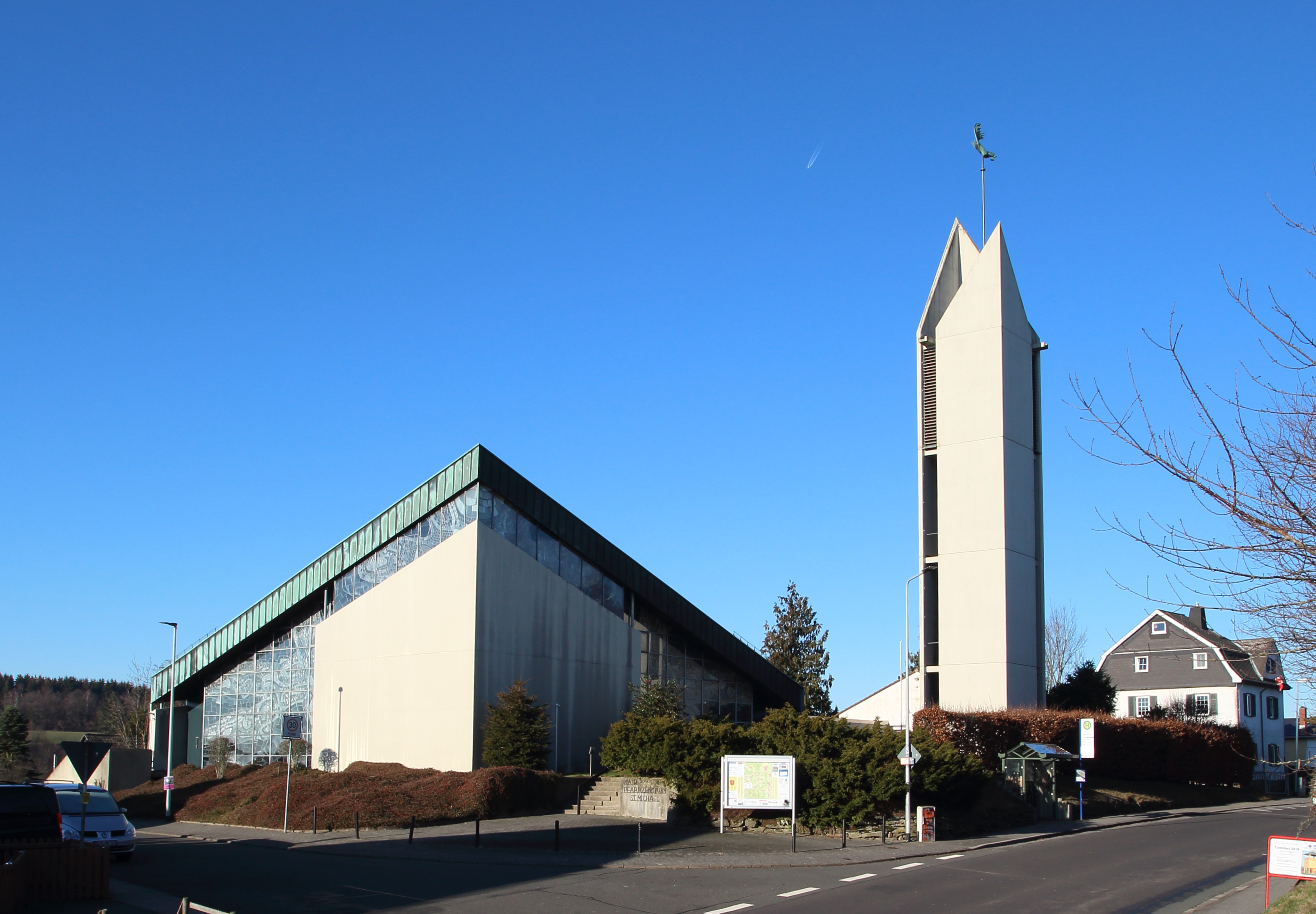 Katholische Pfarrkirche Sankt Michael, Heidenrod-Kemel. Erbaut 1966 als Pfarr- und Garnisonskirche für den (ehemaligen) Bundeswehrstandort Kemel, am 24. September 1967 folgte die Weihe der Kirche. Ausgeführt in Sichtbeteon nach Plänen des Frankfurter Architekten Walter Nicol.